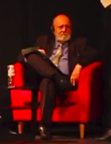 30/05/2018 en el Teatro del Institut français de Madrid, con Rita Maestre, José Félix Tezanos.